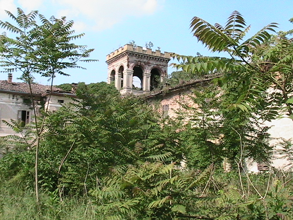 Villarocca - Villa Fraganeschi